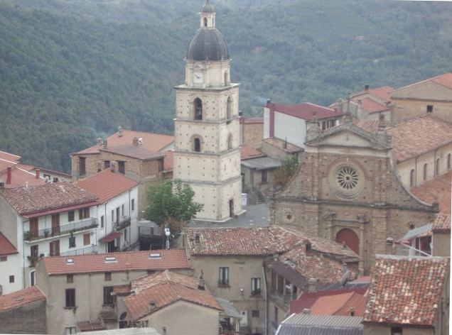 Pedace, Chiesa e Campanile